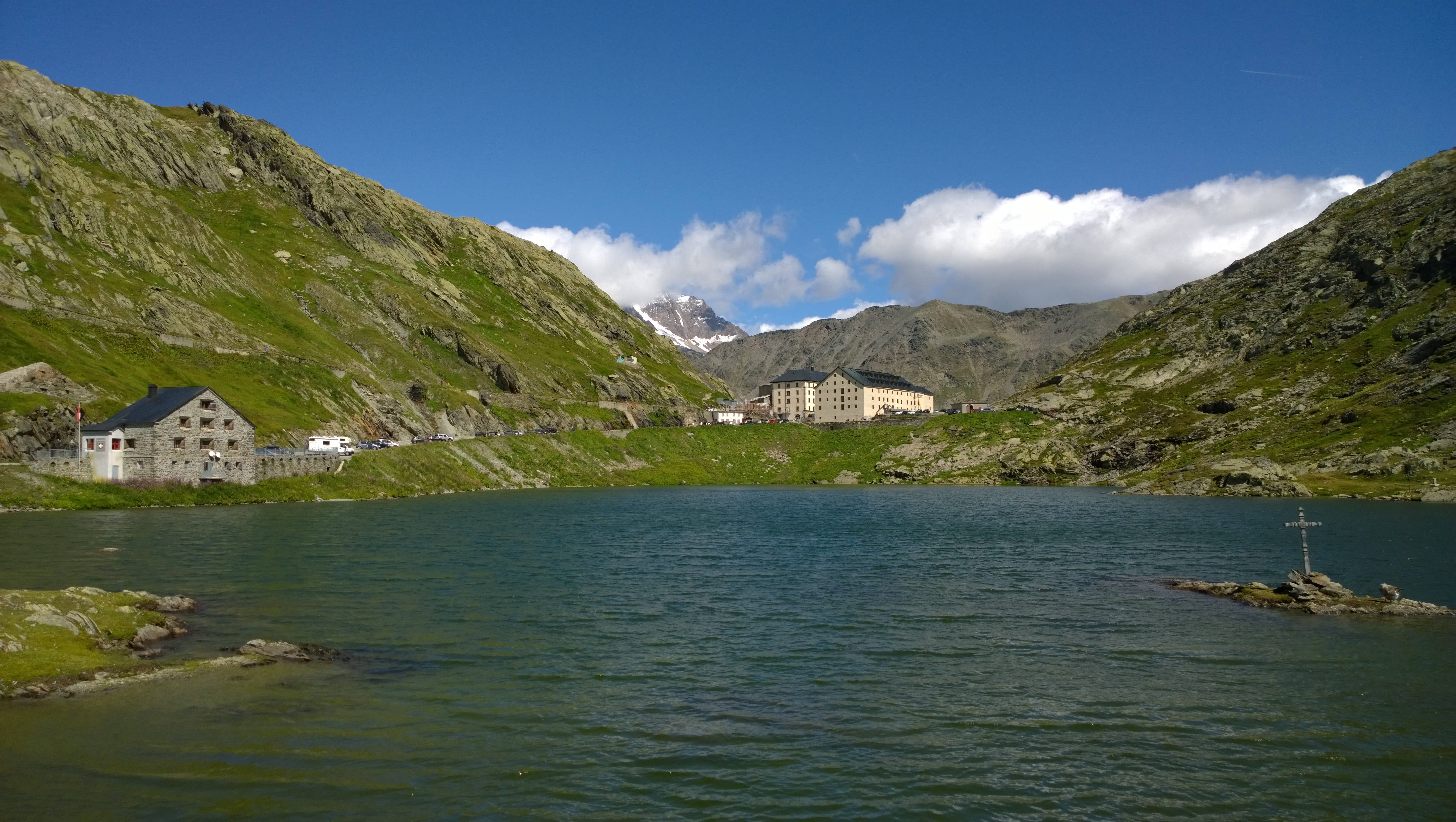 Blick von italienischer Seite auf den Grossen Sankt Bernhard Pass: links die Eidgenössische AFD Zollstelle, mittig der Pass mit den Hospiz Häusern auf dem Grossen Sankt Bernhard